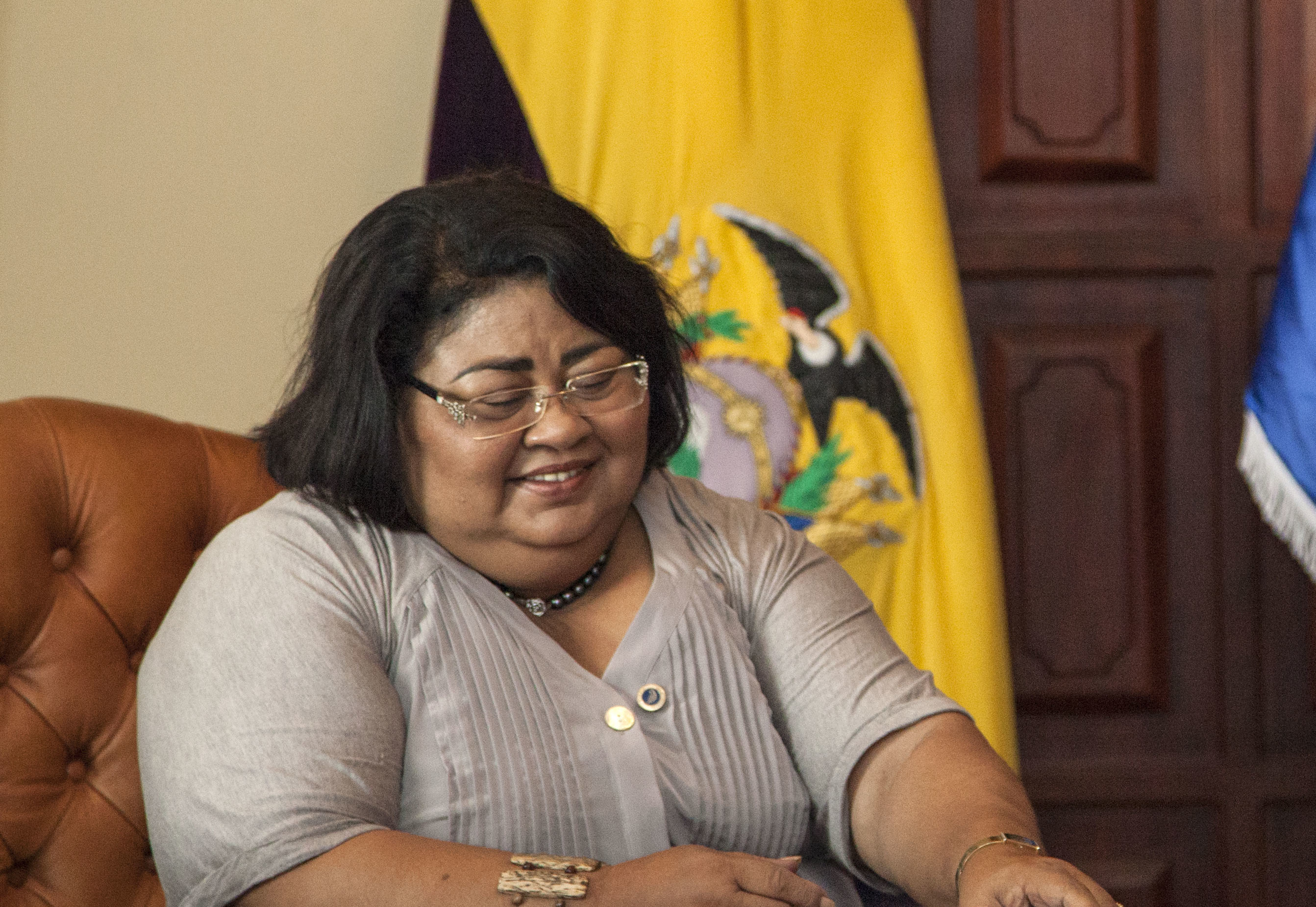 Quito (Ecuador), 12 de noviembre 2013. El Canciller Ricardo Patiño y la Presidenta Pro Témpore de UNASUR, Jennifer Van Dijk-Silos, firmaron un acuerdo relativo a los Privilegios e Inmunidades de los Integrantes de la Misión Electoral para las Elecciones Seccionales del 23 de febrero de 2014.